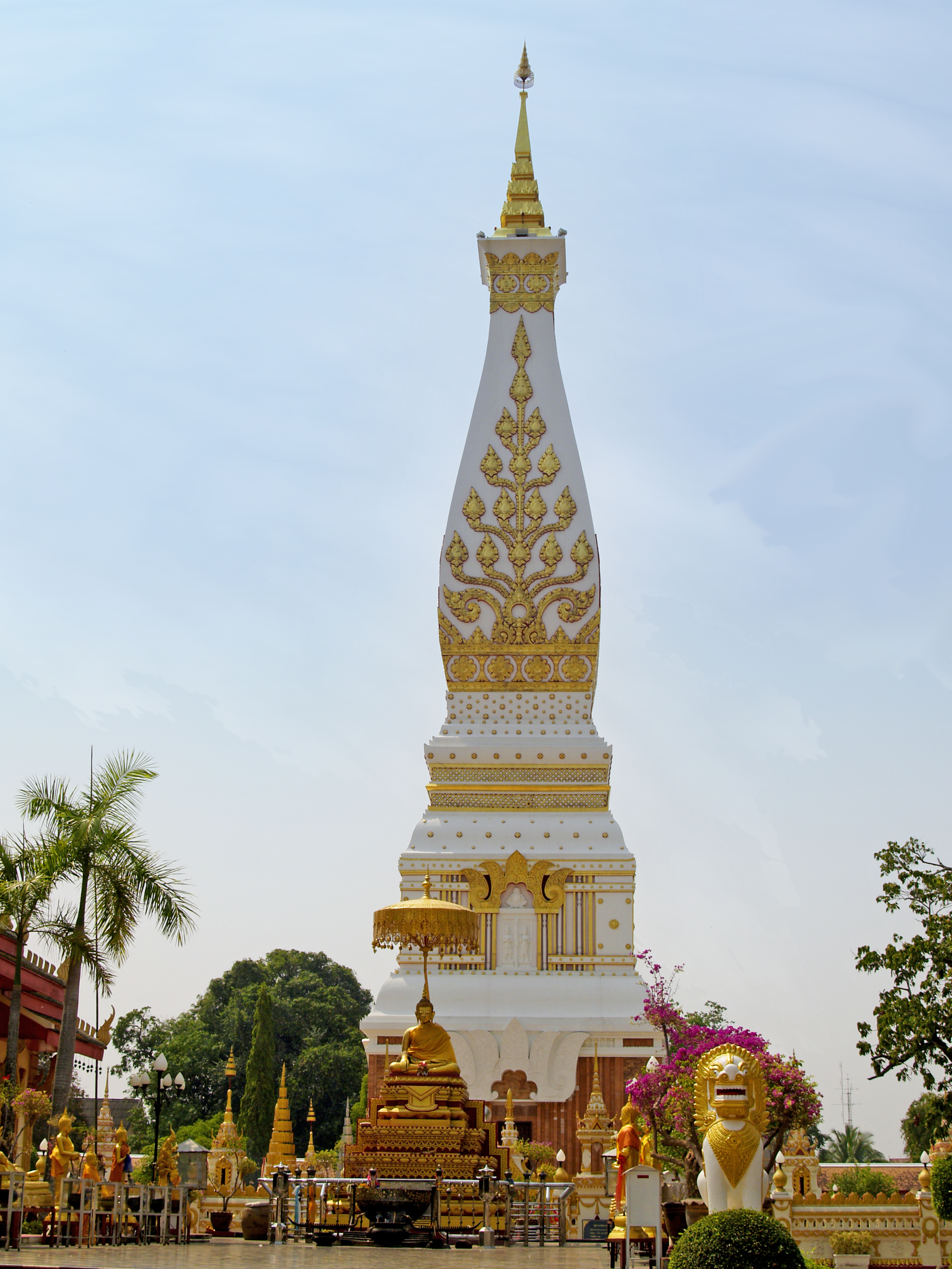 วัดพระธาตุพนมวรมหาวิหาร(พระธาตุพนม)